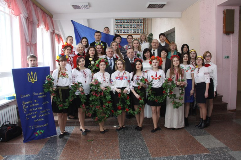 Колектив у творчому амплуа